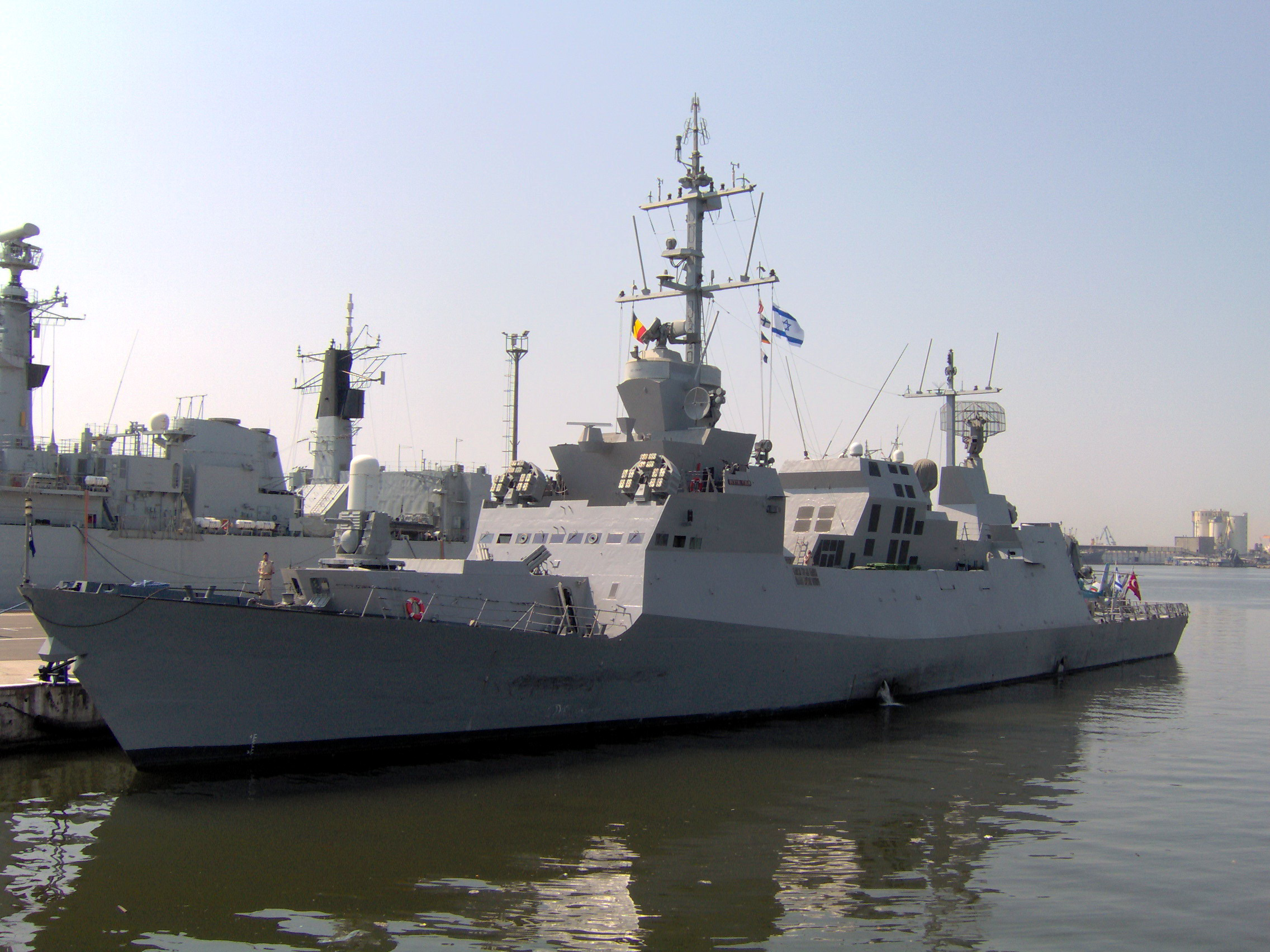 Israeli missile corvette "Eilat"